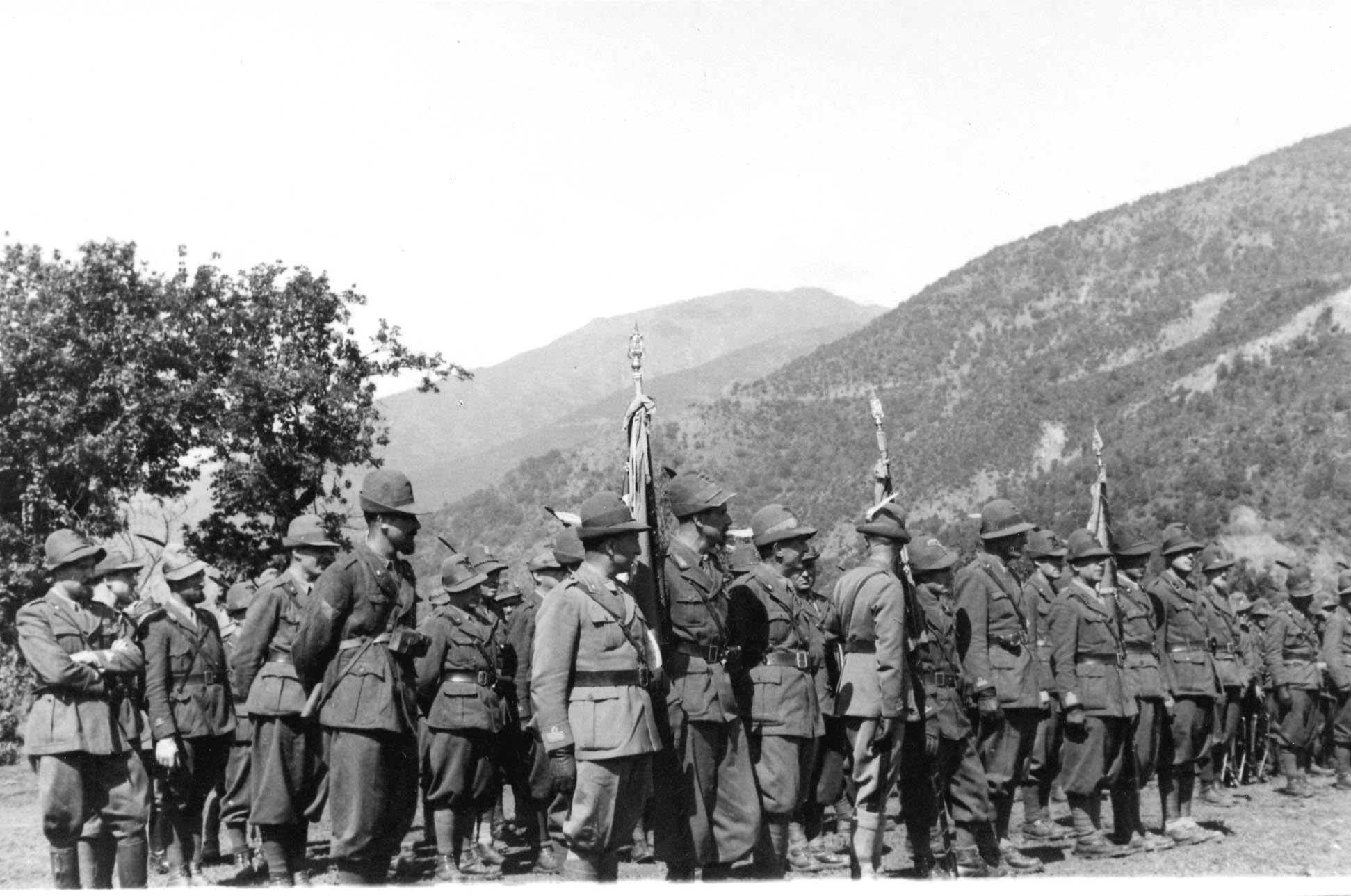 Librazo: verso la rivista del Re